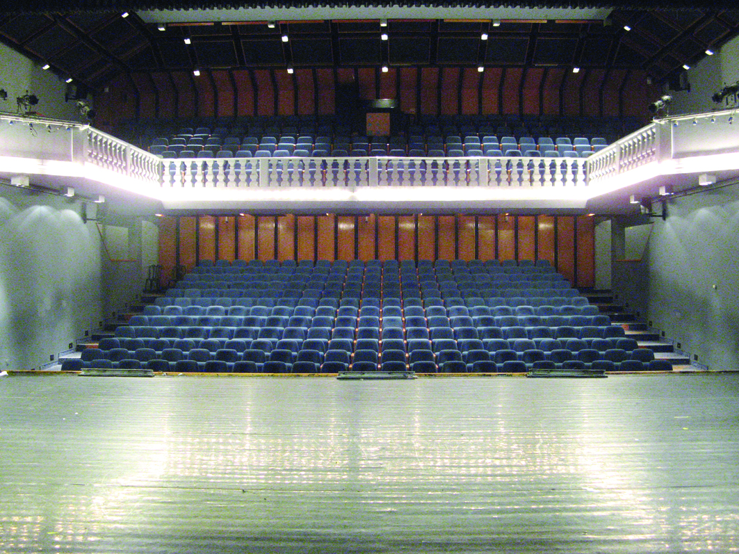 Suzanne Dellal Hall